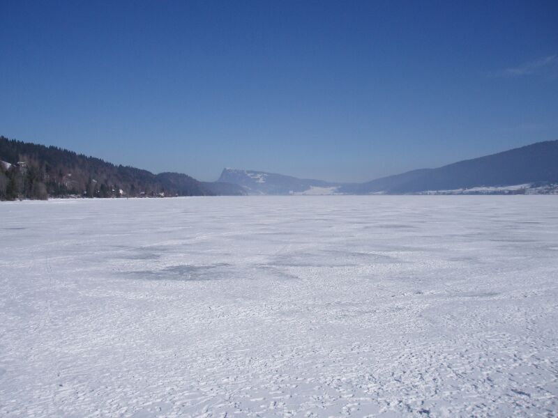 Der zugefrorene Lac de Joux von Le Rocheray, im Hintergrund die Dent de Vaulion